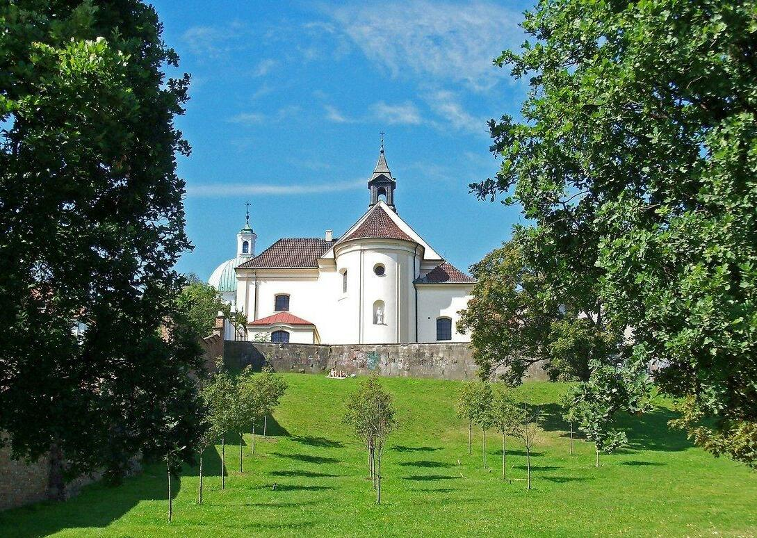 Kościół św. Benona widziany spod skarpy